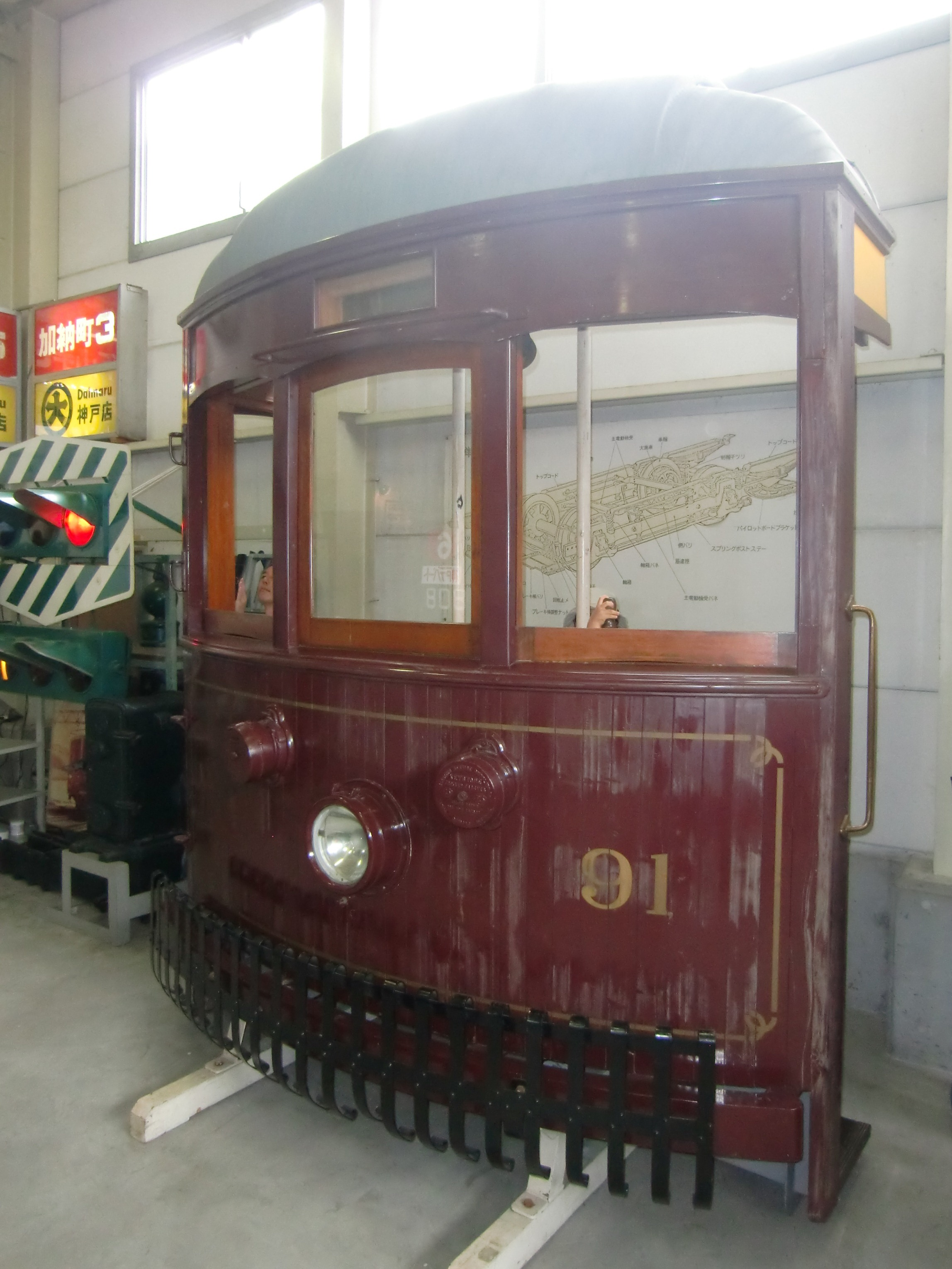 神戸市電庫で保存されているC車（91）の復元された前頭部（2012.10.14撮影）